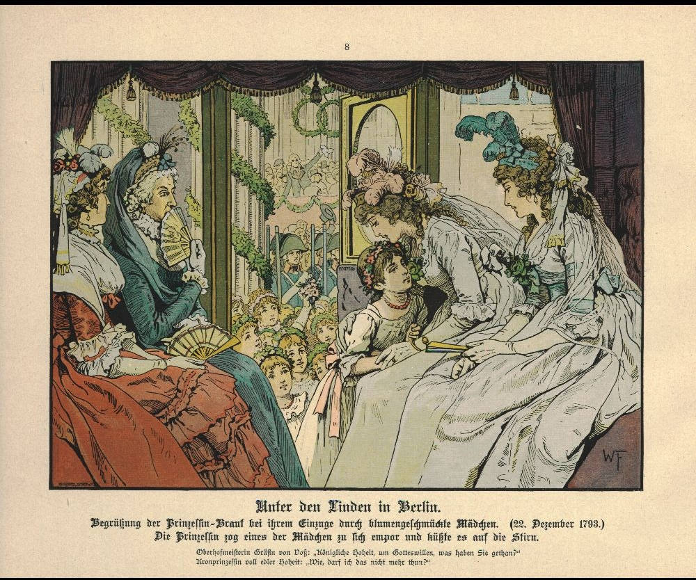 Die Braut Prinzessin Luise küsst die Stirn einer Gratulantin aus dem Volk. Oberhofmeisterin Gräfin von Voß ist entsetzt. (Auch Prinzessin Friederike (rechts) wird heute noch heiraten)